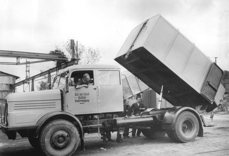 Zentralbild-Hesse 19.10.1956 Neue Großschneepflüge aus dem VEB Spezialfahrzeugwerk Berlin Einen neuen Großschneepflug, der hauptsächlich die Schneebeseitigung auf Autobahnen und Chausseen gedacht ist, entwickelten die Techniker und Ingenieure des VEB Spezialfahrzeugwerkes Berlin-Adlershof. Sämtliche Arbeitsvorgänge diese neuen Gerätes werden vollhydraulisch durchgeführt. Die Räumungsgeschwindigkeit des Fahrzeuges beträgt 7,5 km-std und kann bei einer größeren Schneedecke bis auf 1,5 km-std reduziert werden. 20 dieser Fahrzeuge sollen noch in diesem Jahr fertiggestellt werden. UBz. Ein Spezialmüllwagen aus der laufenden Produktion des Werkes.